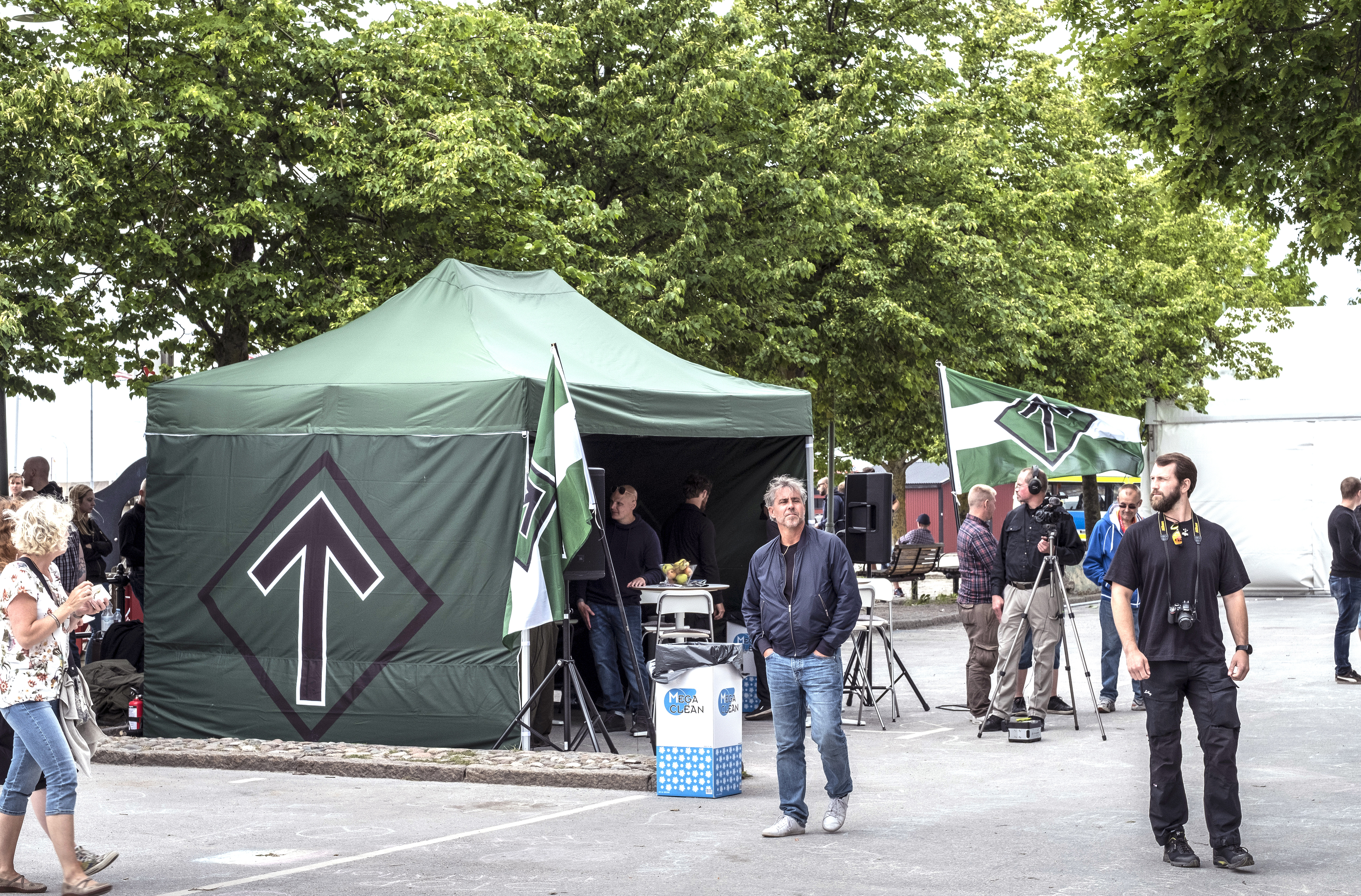 Nazistiska Nordiska Motståndsrörelsen kom till Almedalsveckan i Visby fredagen den 7 juli 2017, samma dag som Sverigedemokraternas ledare Jimmie Åkesson ska hålla sitt partiledartal i Almedalen. Nordiska Motståndsrörelsen har hyrt en plats vid hamnen och fått tillstånd av polisen att närvara de tre sista dagarna under Almedalsveckan. Photo: News Øresund - Johan Wessman © News Øresund - Johan Wessman (CC BY 3.0). Detta verk av News Øresund är licensierat under en Creative Commons Erkännande 3.0 Unported-licens (CC BY 3.0). Bilden får fritt publiceras under förutsättning att källa anges. .The picture can be used freely under the prerequisite that the source is given. News Øresund, Malmö, Sweden News Øresund är en oberoende regional nyhetsbyrå som är en del av det oberoende dansk-svenska kunskapscentrat Øresundsinstituttet..